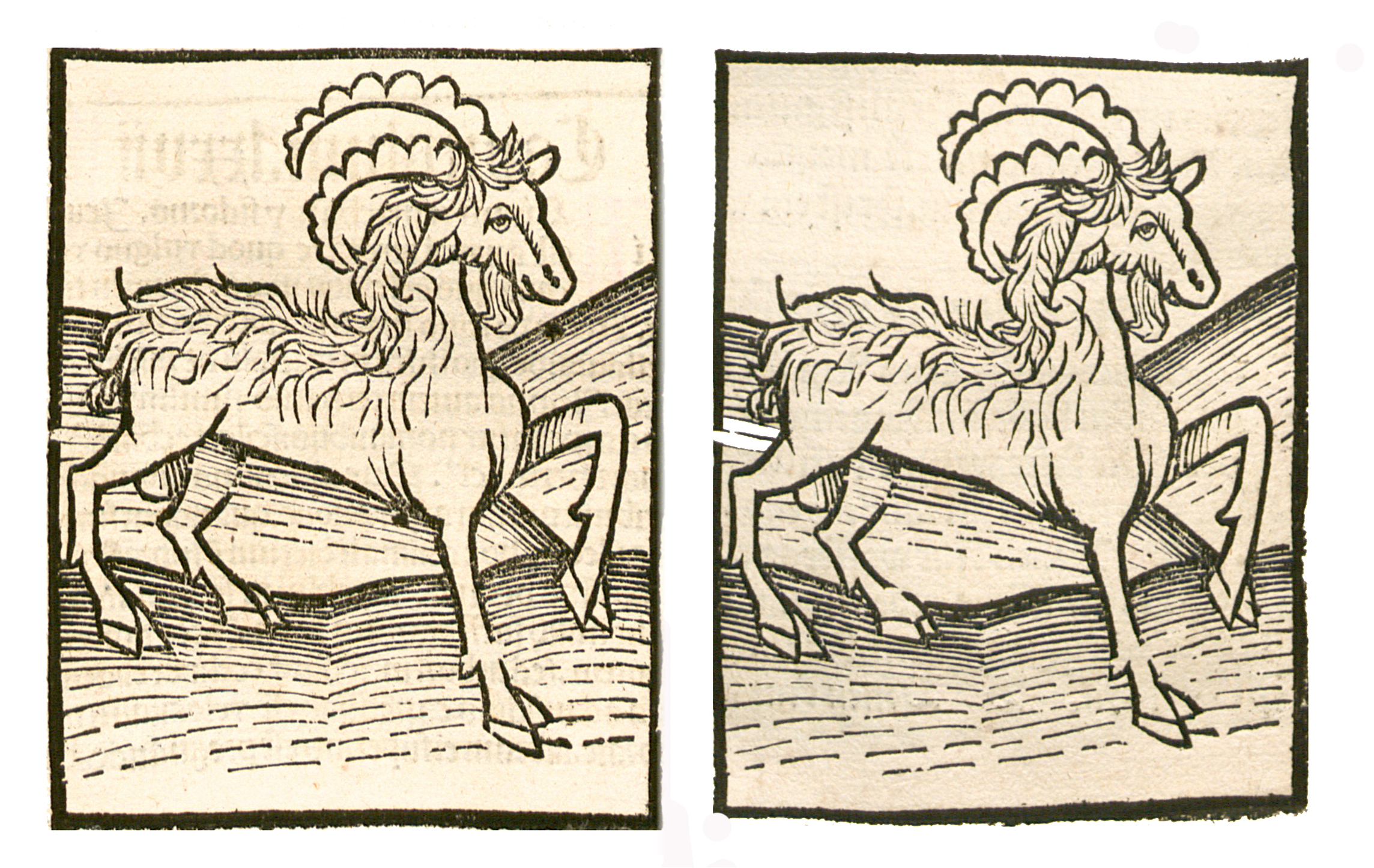 Abbildung von: Bocksblut